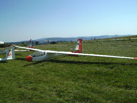 ASW-15b